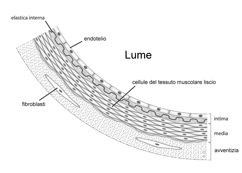 La bildo estas kopiita de en. La originala priskribo estas: ==